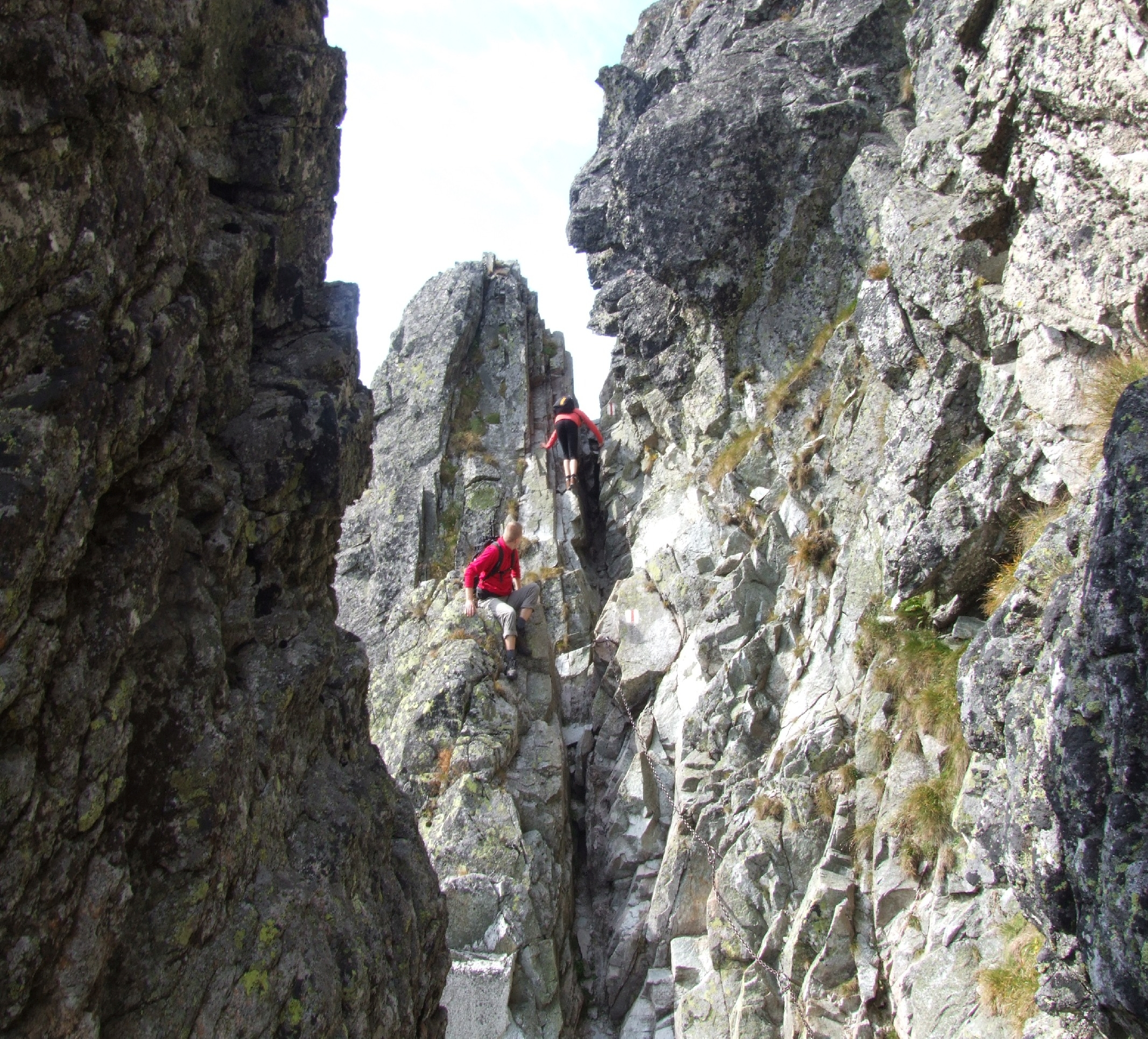 Zejście z przełączki pod Budzową Igłą na szlaku Orlej Perci